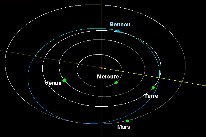 Orbite de l'astéroïde Bennou et position au 6 septembre 2016